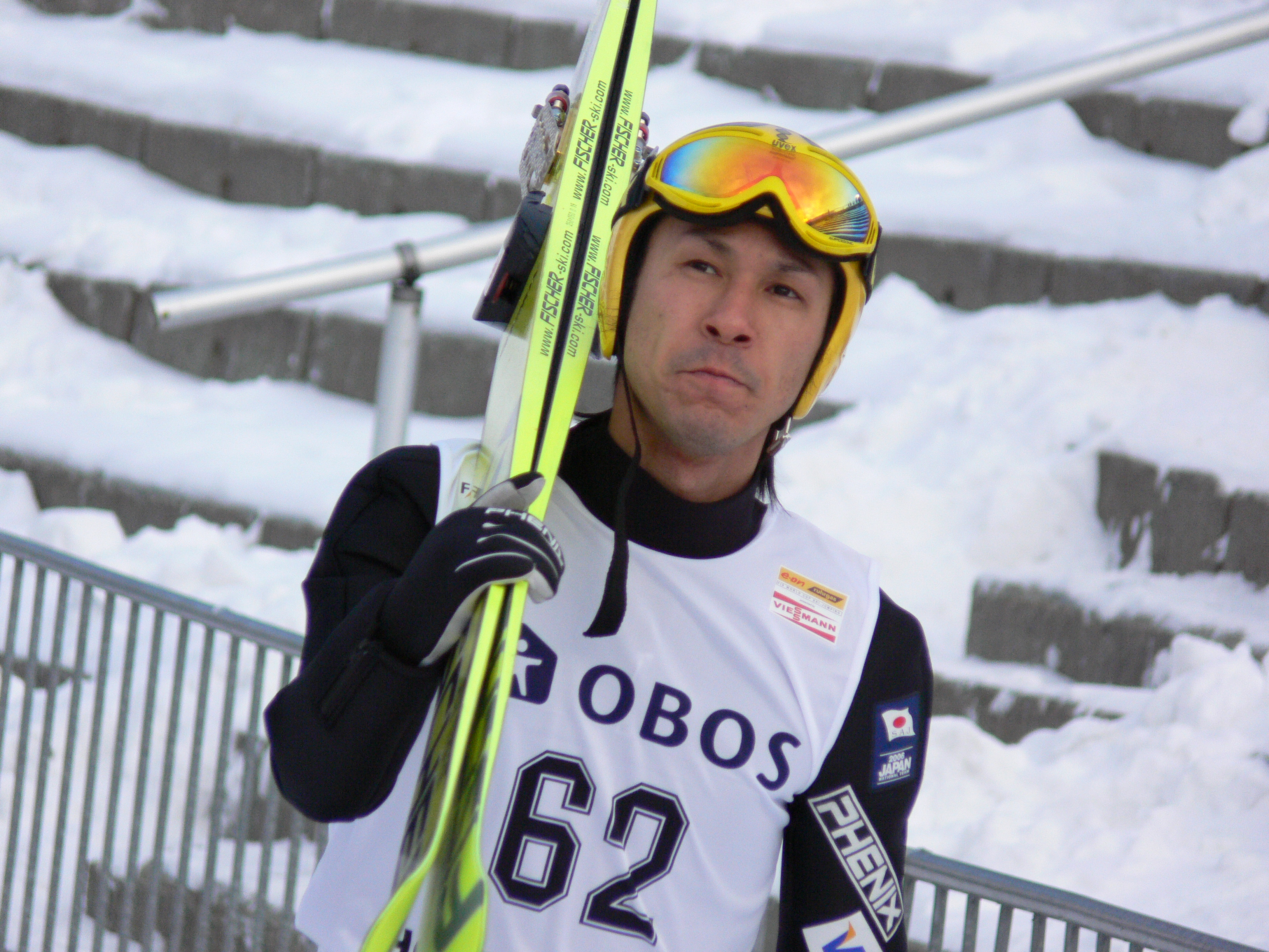 Noriaki Kasai at the Holmenkollen WC event 2006.